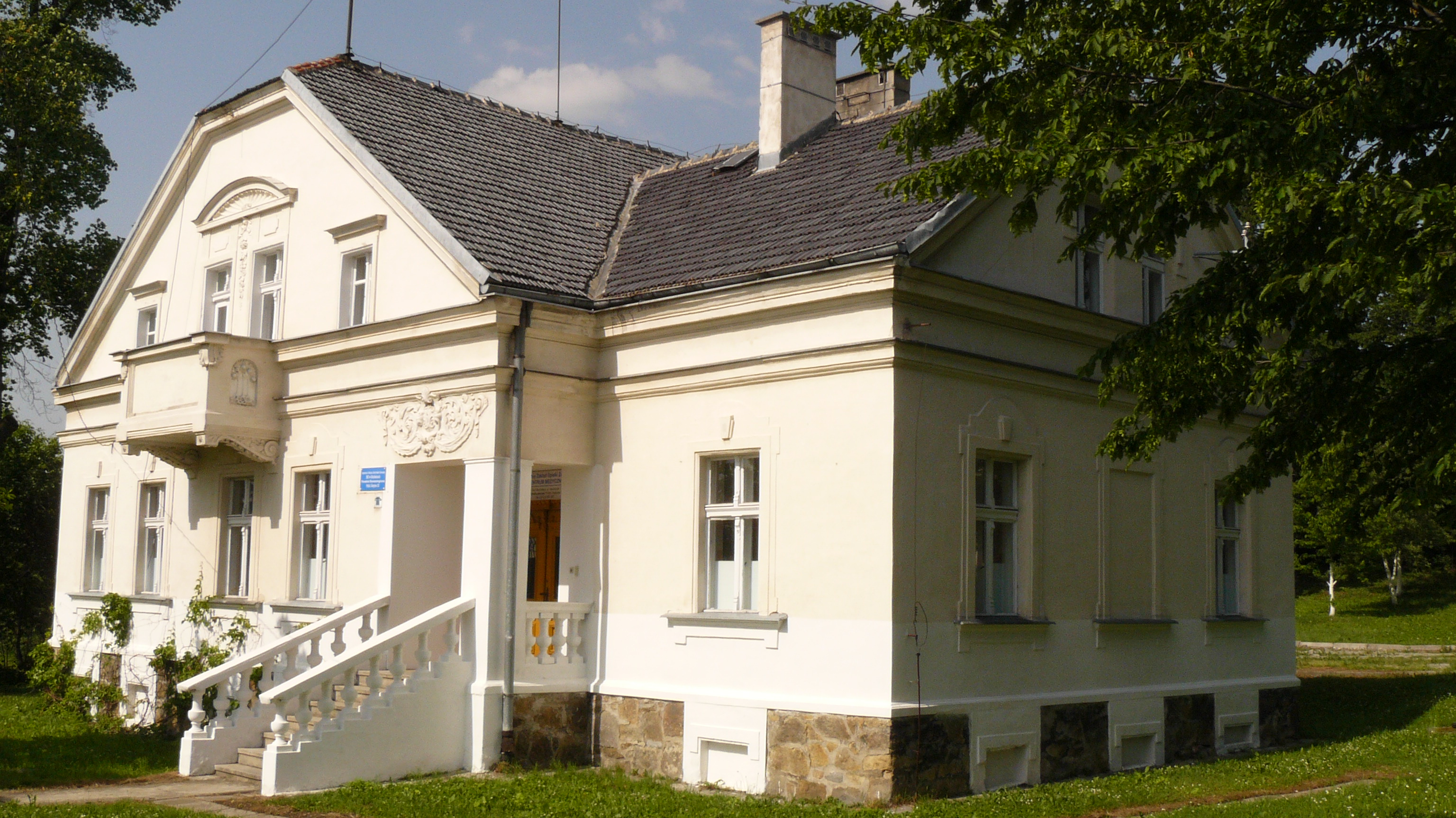 Polski Świętów - dawne przedszkole (po II wojnie światowej), później ośrodek zdrowia.